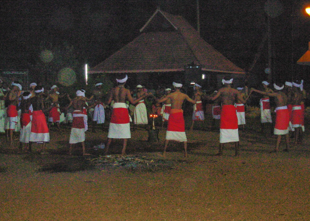 പടയണിയിൽ കോലം തുള്ളലിനു മുൻപുള്ള പരിപാടി.. പേരറിയില്ല :)